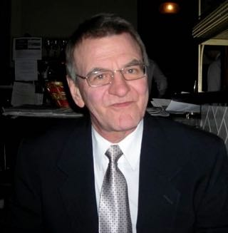 Jacques Faubert compositeur québécois